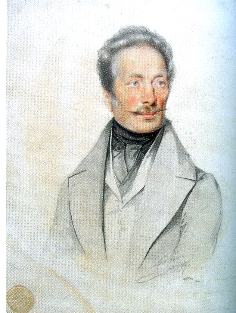 Fejérváry Gábor magyar archeológus.